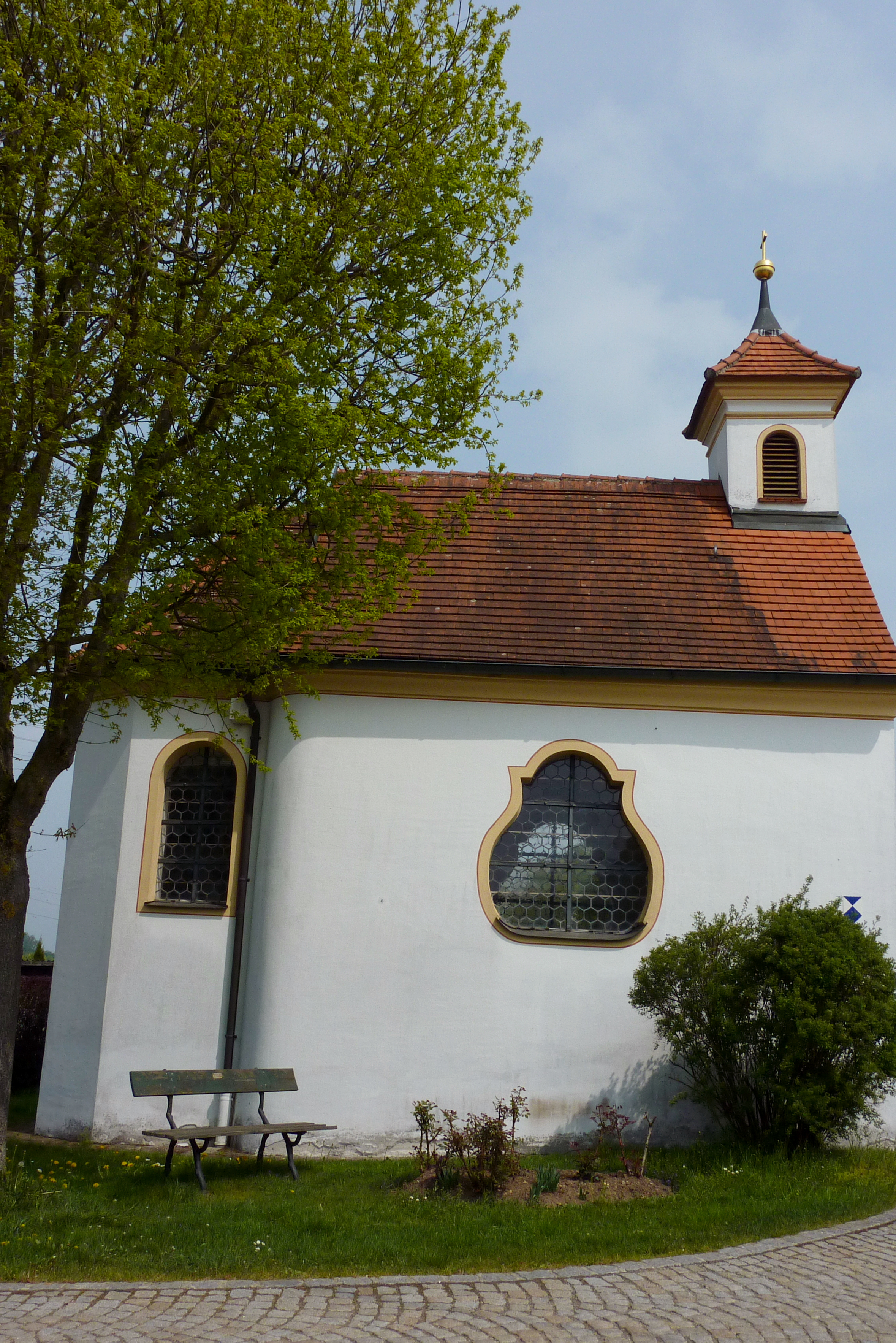 Katholische Kapelle Franz Xaver in Bieselbach, einem Ortsteil von Horgau im Landkreis Augsburg